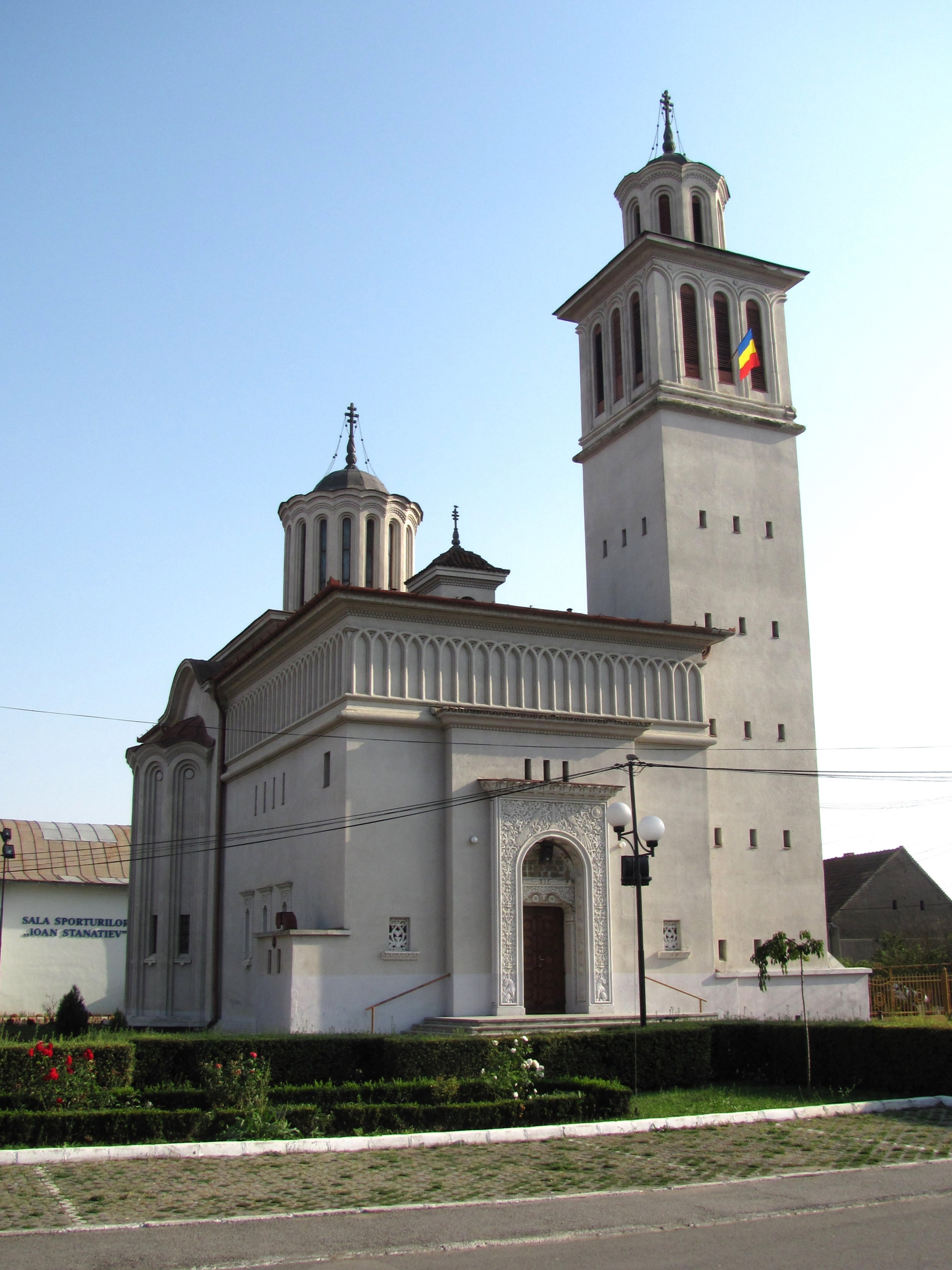 Câmpia Turzii, Piața Mihai Viteazu nr.9, Biserica Ortodoxă "Învierea Domnului” 02